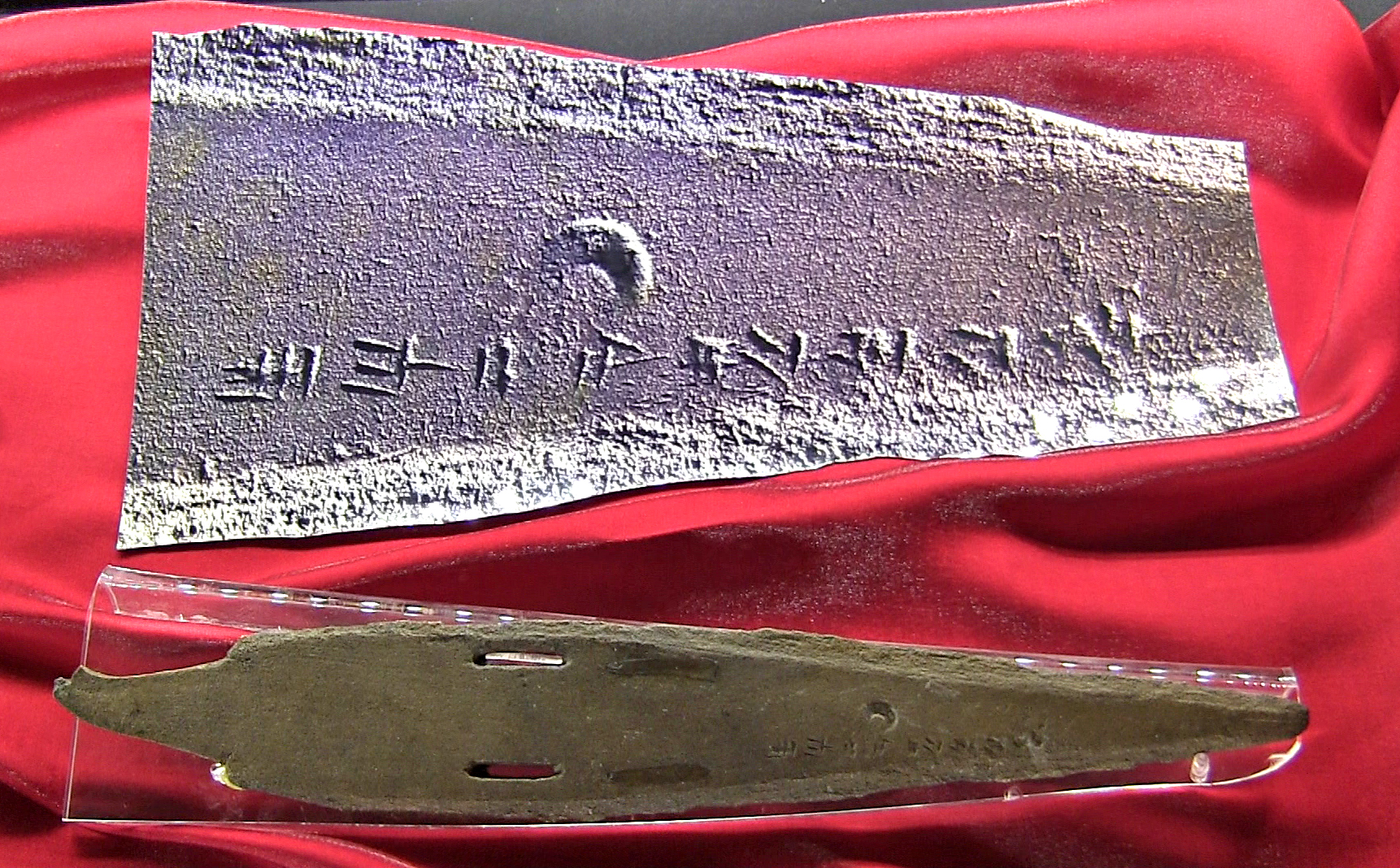 Bronzedolch des hethitischen Königs Anitta aus Kaniš-Neša (heute Kültepe) bei Kayseri, Zentraltürkei. 18. Jahrhundert v. Chr., Länge 29 cm, oben Vergrößerung der Keilschrift, Museum für anatolische Zivilisationen, Ankara